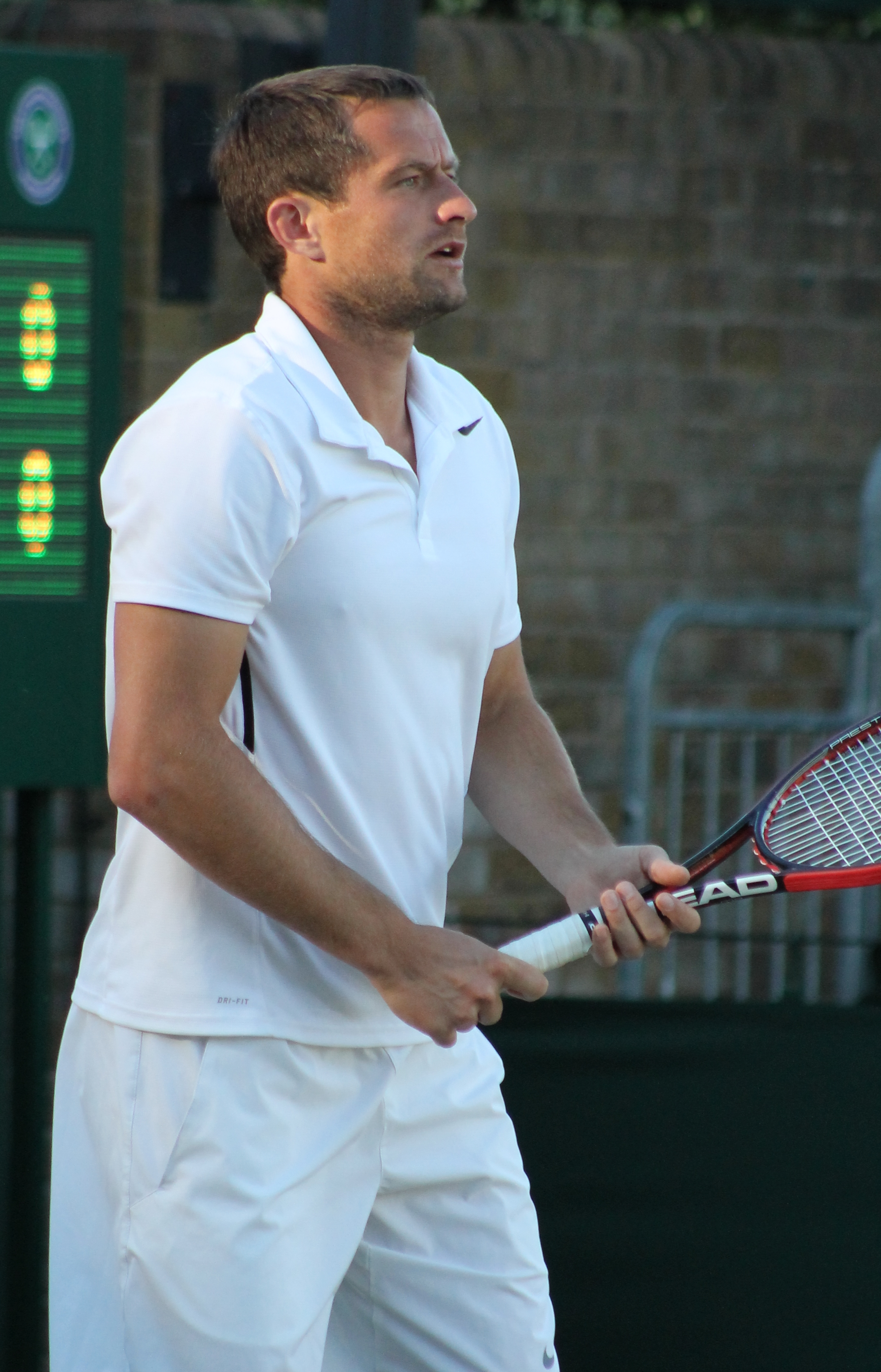 Elgin WM14